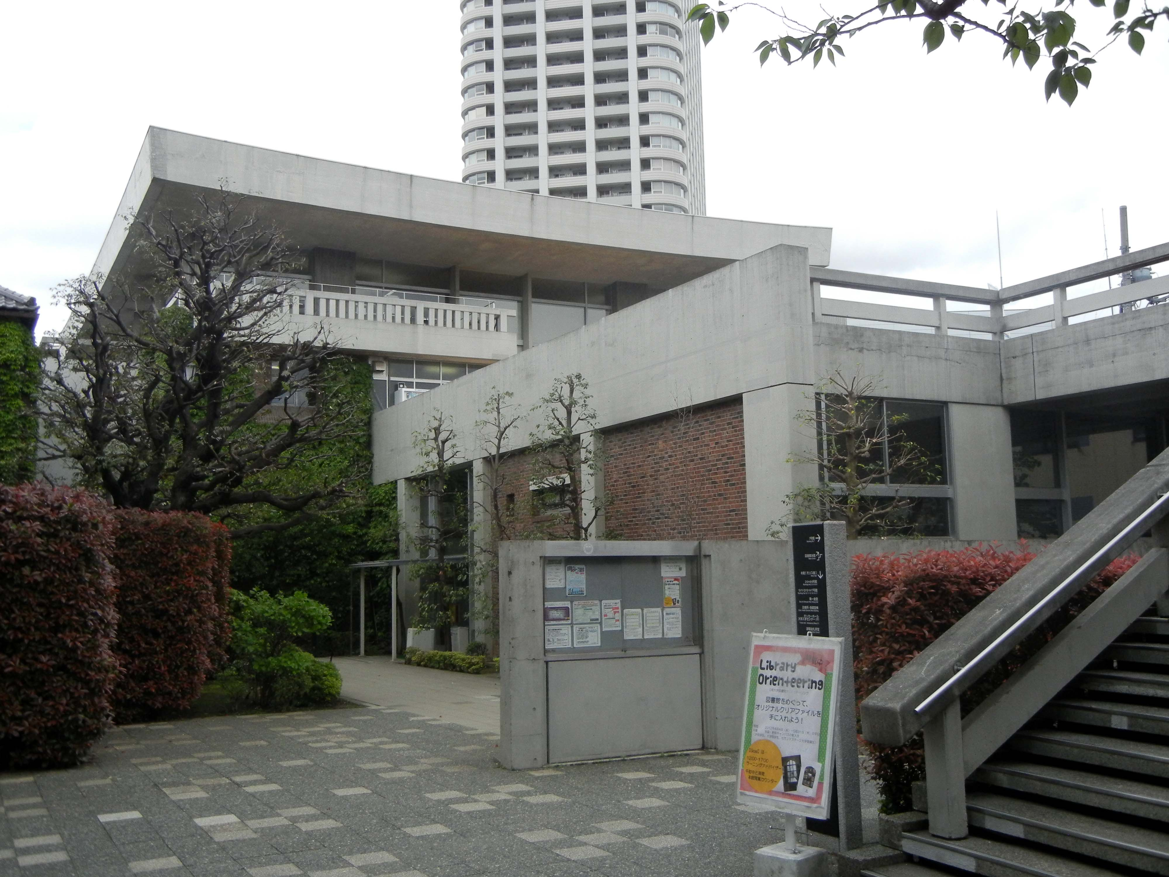 立教大学池袋キャンパス図書館本館（新館）